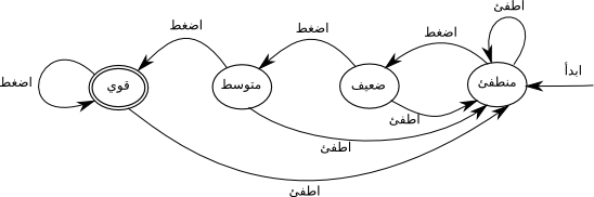 Arabic Automaton 2